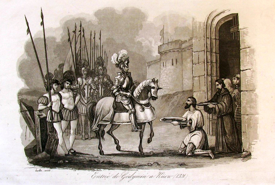 Беларуская (тарашкевіца): Уваход вялікага князя Гедзіміна (Giedzimin) у Кіеў (Kyiv)